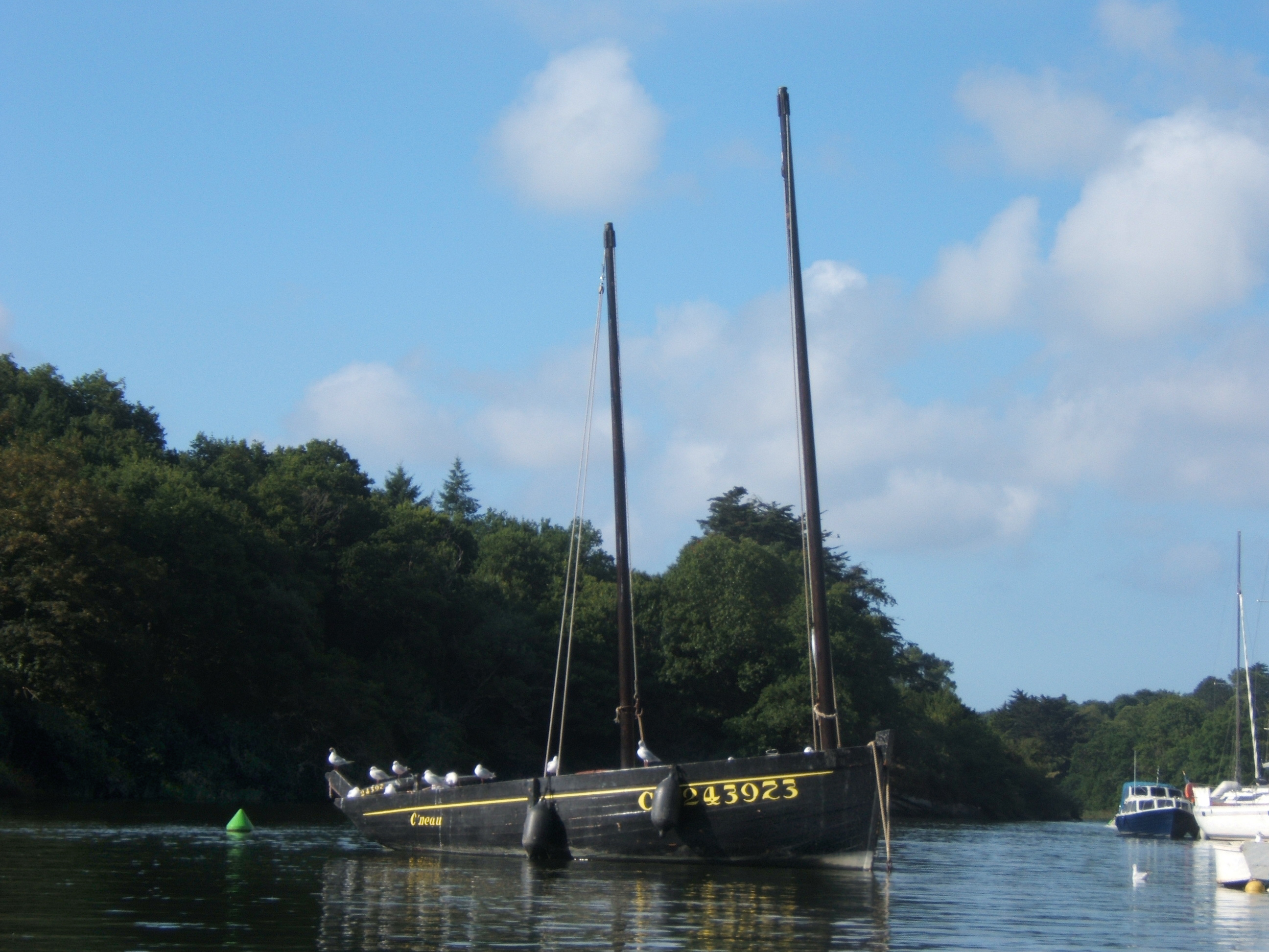 Un vieux gréement mouillant sur l'Aven, près de Pont-Aven.